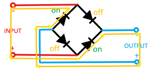 Gambar Skema Aliran Tegangan pada Kondisi Kedua Dioda Bridge